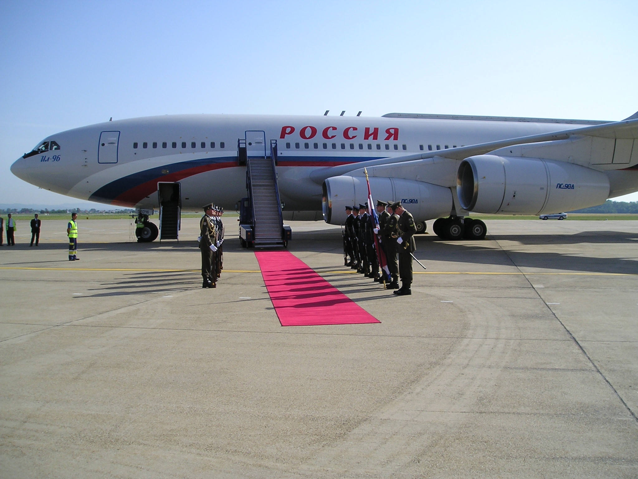 Počasna bojna ispred aviona ruskog predsjednika